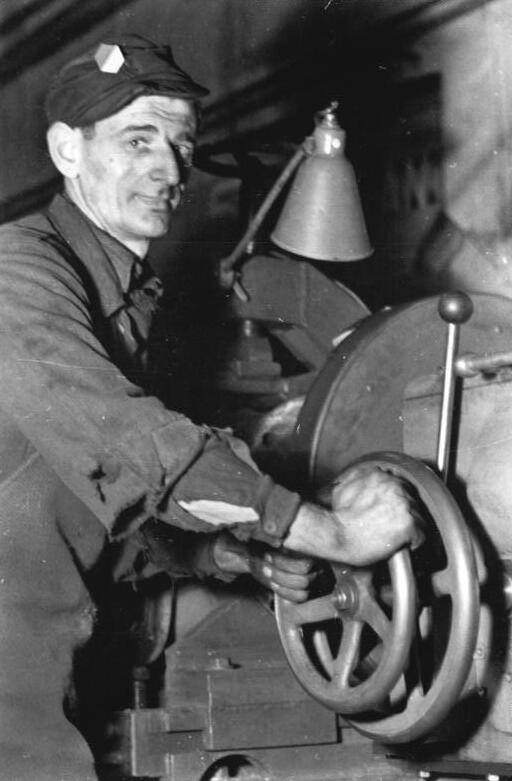 Industriearbeiter an Schaltrad Illus Biscan 27.12.50 Dreher-Aktivist Franz Knochtel vom Polte-Werk, MAgdeburg, kurbelt an für die Arbeit zum Fünfjahrplan. So wie er gehen die Millionen Werktätigen in der Deutschen Demokratischen Republik mit frischer Kraft ans Werk für ein Leben in Frieden und Wohlstand.